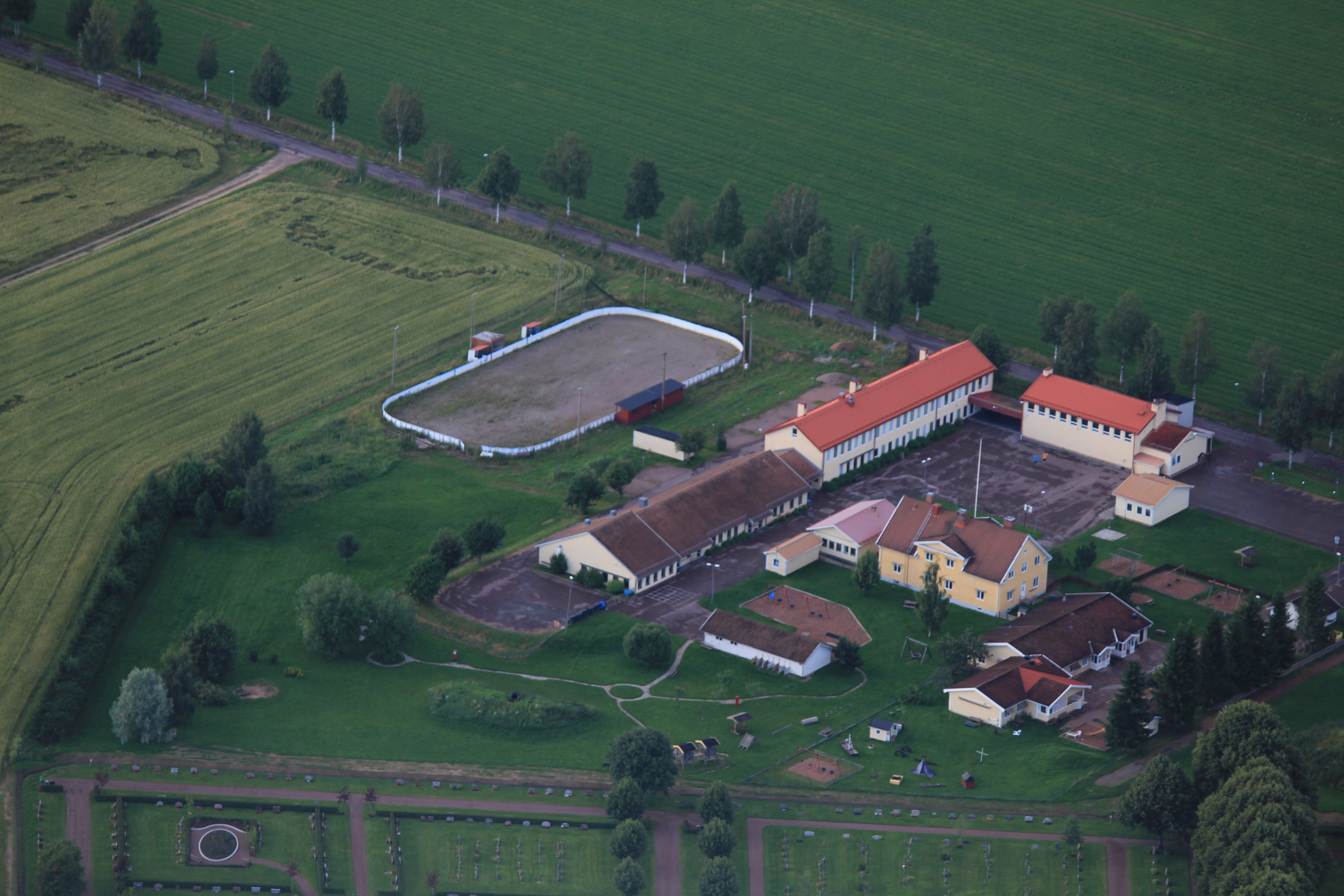 Flygfoto över Kyrkskolan, Gagnef, Dalarnas län, Sverige This aerial photograph has been approved for publishing by the Swedish Armed Forces with the ID: FMTM 10 830:11043 This tag does not indicate the copyright status of the attached work. A normal copyright tag is still required. See Commons:Licensing for more information. English | svenska | +/−